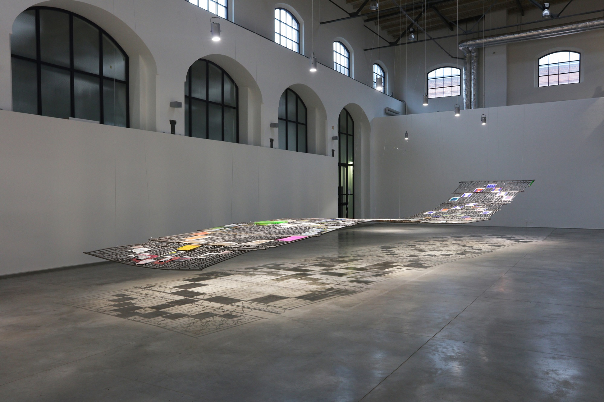 Výstava Svätopluka Mikyty Ornamentiana, Fait Gallery MEM